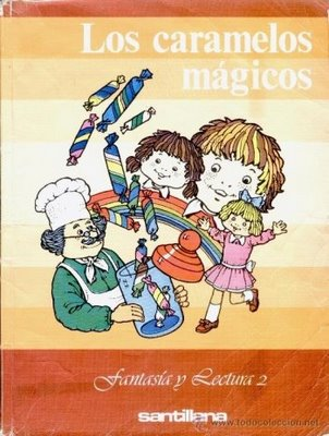 Fotografía que muestra la portada del libro "Los caramelos mágicos".